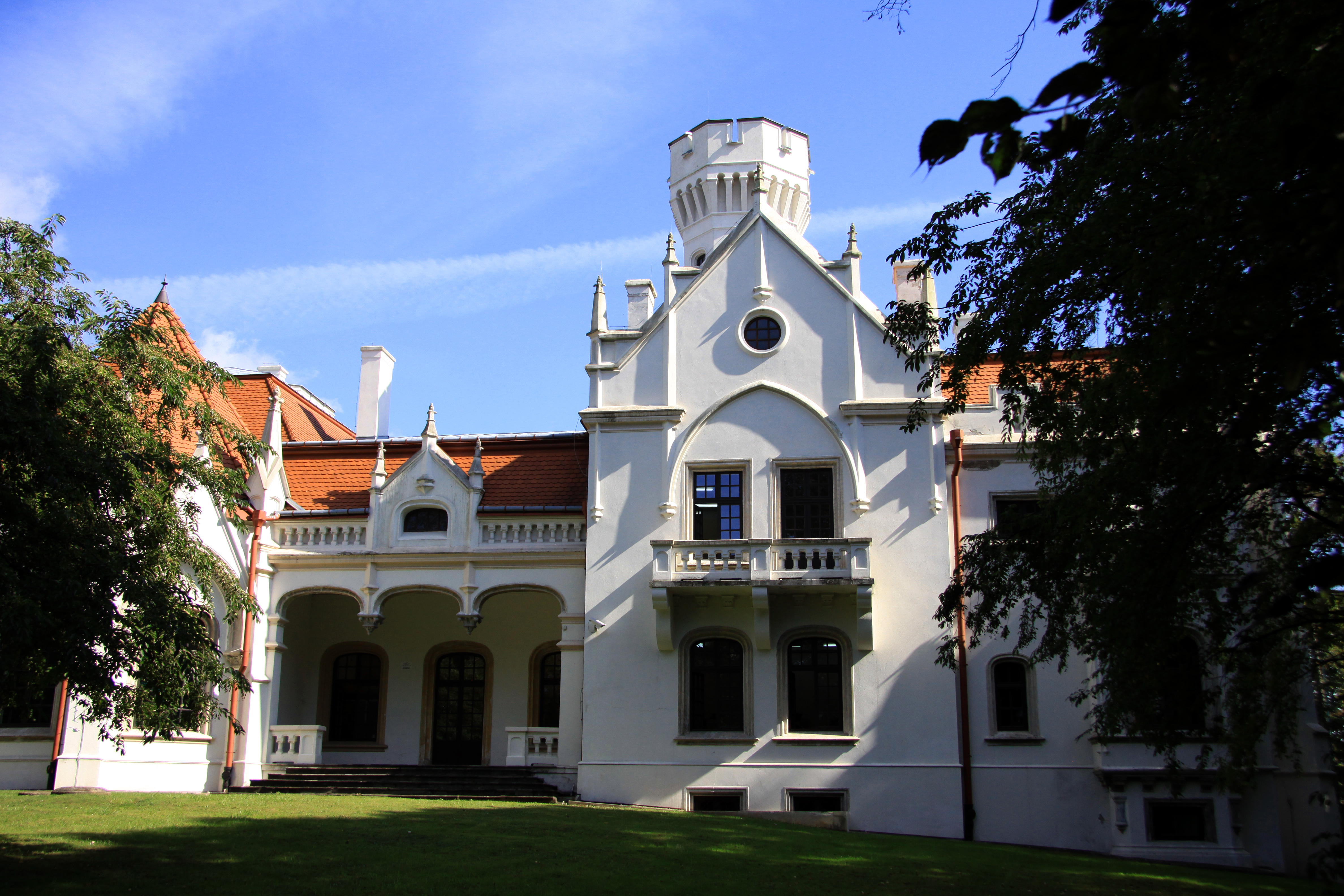 Jasło Gorajowice - zespół pałacowy, 2 poł. XIX : pałac, 1858